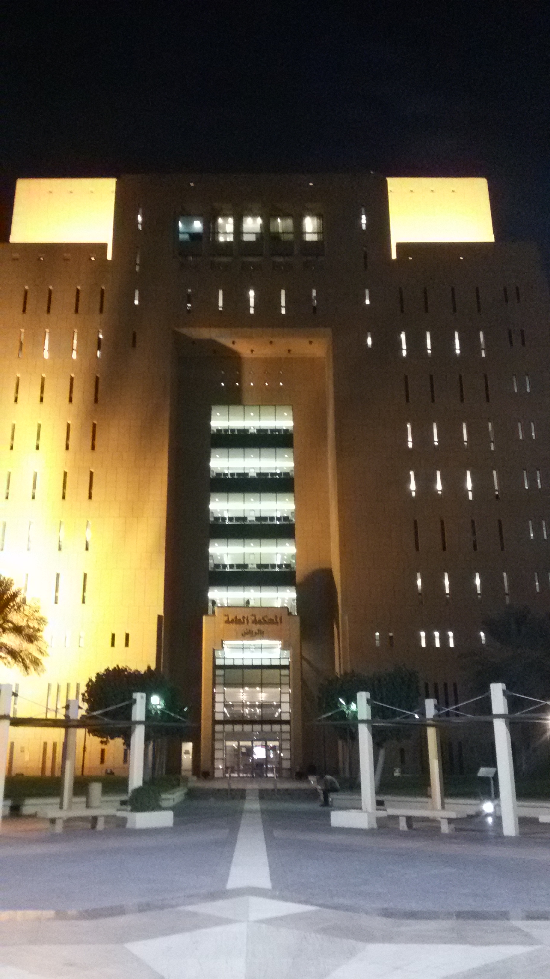 المحكمة العليا بالمملكة العربية السعودية بالعاصمة الرياض